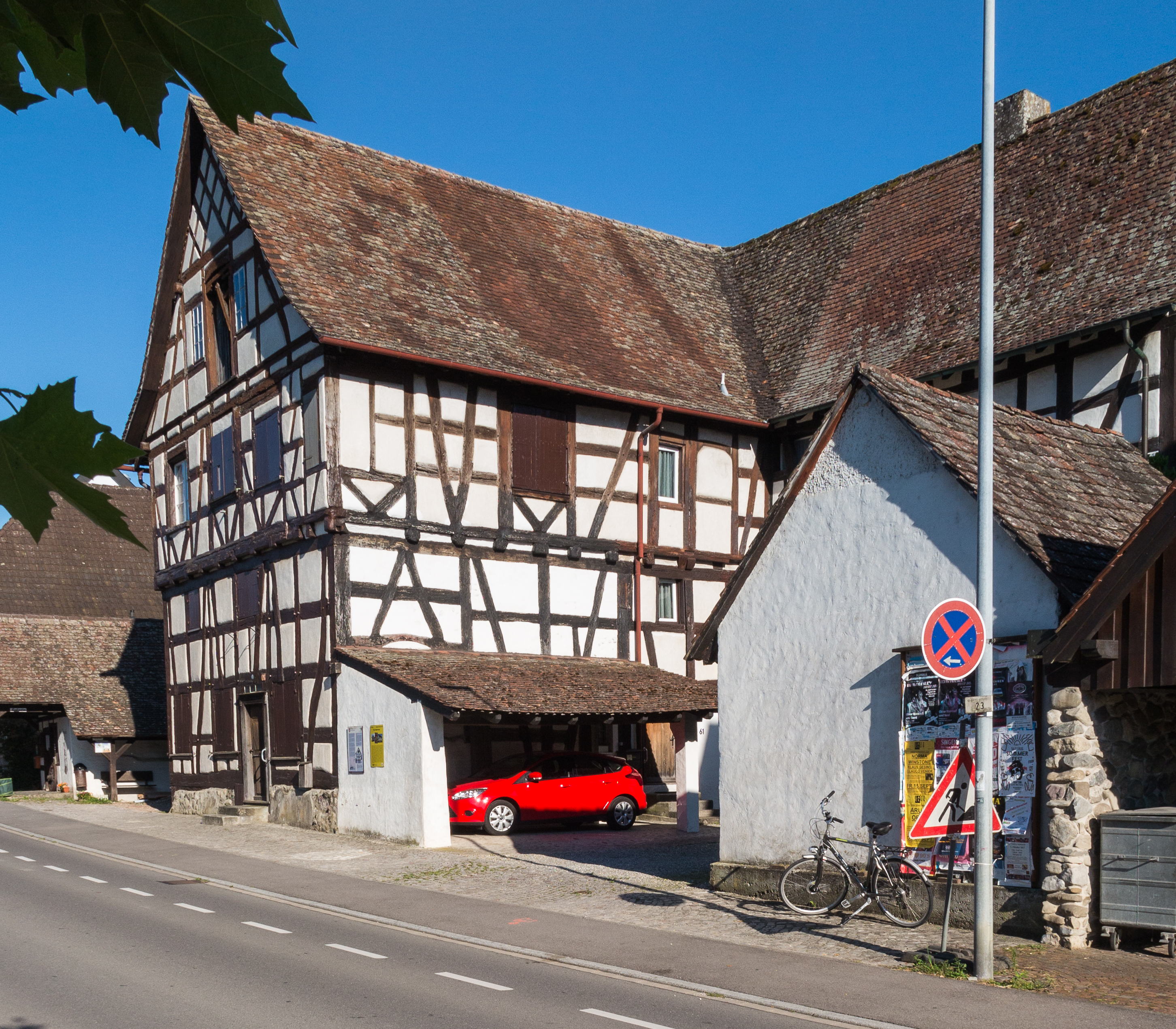 Junkerhaus (Bj. 1579) in Büsingen am Hochrhein